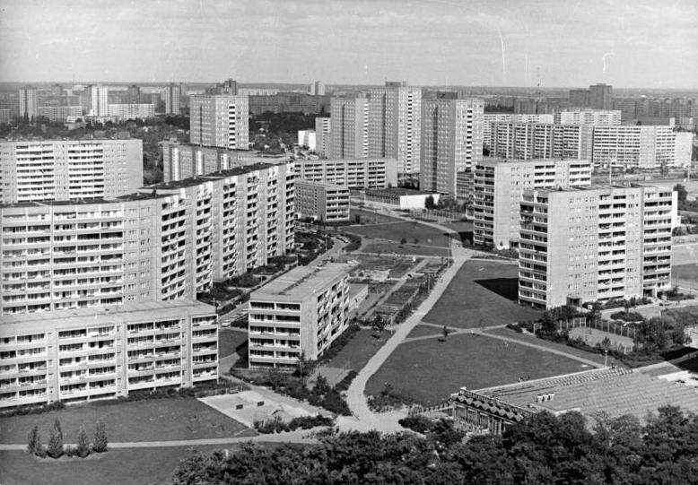 Berlin, Marzahn, Neubaugebiet, Wohnblocks ADN-ZB Deutsche Demokratische Republik Januar 1987 14-87 750 Jahre Berlin Neue Stadtbezirke entstehen Die Hauptstadt der DDR wird sich zu ihrem 750.Geburtstag baulich als ganz jung präsentieren. Mit Berlin-Marzahn (Foto) , mit Hohenschönhausen und Hellersdorf sind in einer historisch kurzen Zeit von zehn Jahren drei neue Stadtbezirke mit rund 91.400 Wohnungen einschließlich Gesellschaftseinrichtungen entstanden, die in ihren Größenordnungen mit Städten vergleichbar sind, deren Entstehung und Wachstum sich in Jahrhunderten vollzog. Im Zeitraum von 1986 bis 1990 werden in der Hauptstadt 163.000 Wohnungen neu gebaut bzw. modernisiert. Die FMieten bleiben weiter stabil, sie betragen etwa fünf Prozent des Familieneinkommens. Reporter: Link Copyright: ADN-Zentralbild Information added by Wikimedia users.Das Bild zeigt den Murtzaner Ring (Blick vom Park Akazienwäldchen, etwa ab Ecke Langhoffstraße) von Süd nach Nord Richtung Poelchaustraße (an der das Hochhaus Bildmitte-links steht). Die langgestreckten Wohnhäuser sind vom Typ WBS70 und die Hochhäuser vom Typ WHH-GT18.